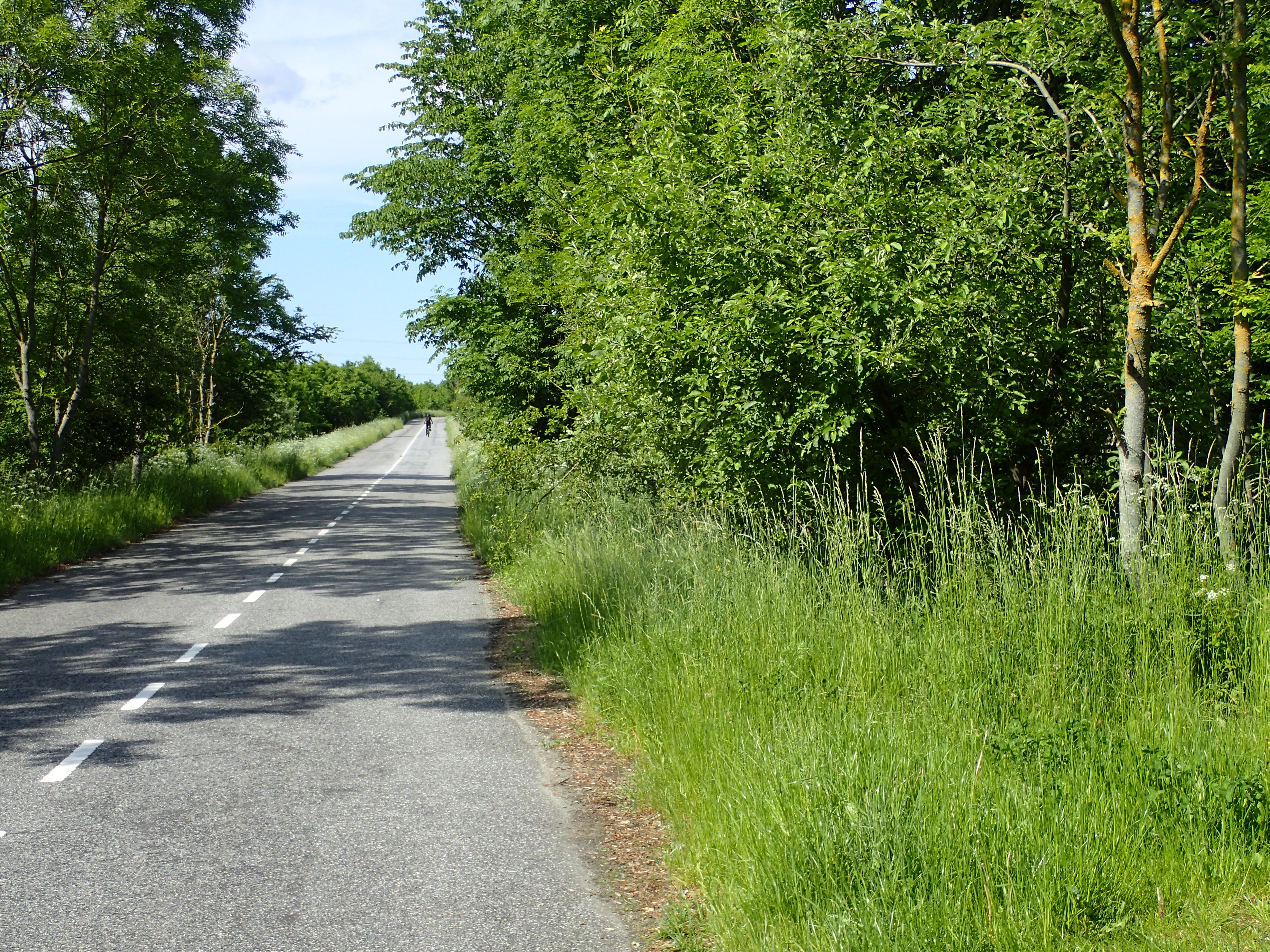 Årslev supercykelsti, gennem den nyrejste del af Årslev skov.